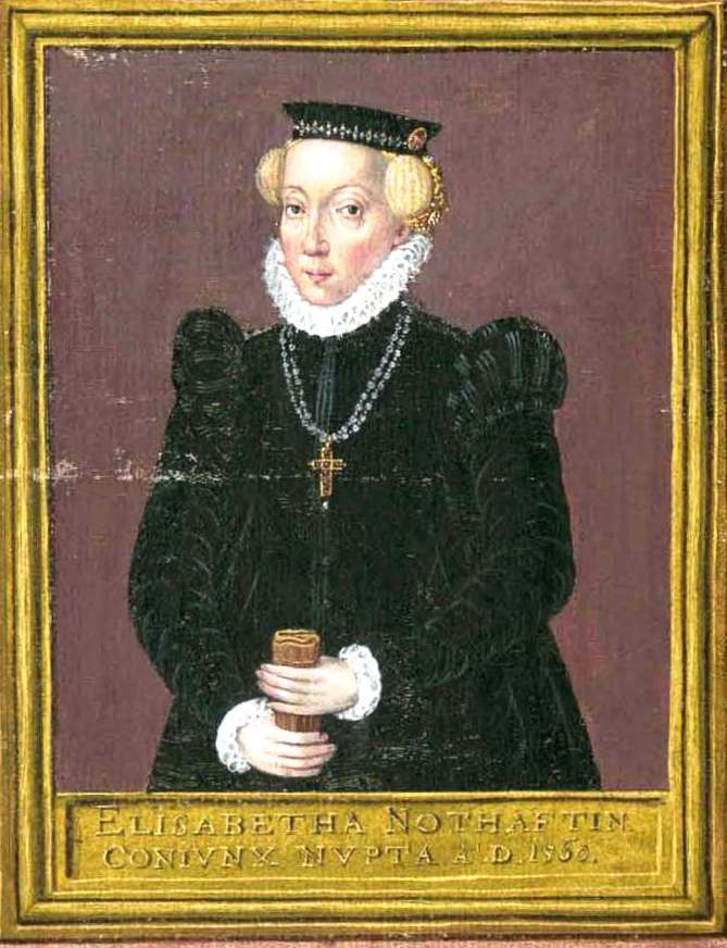 Elisabeth Fugger, geb. Notthafft (1539–1582)